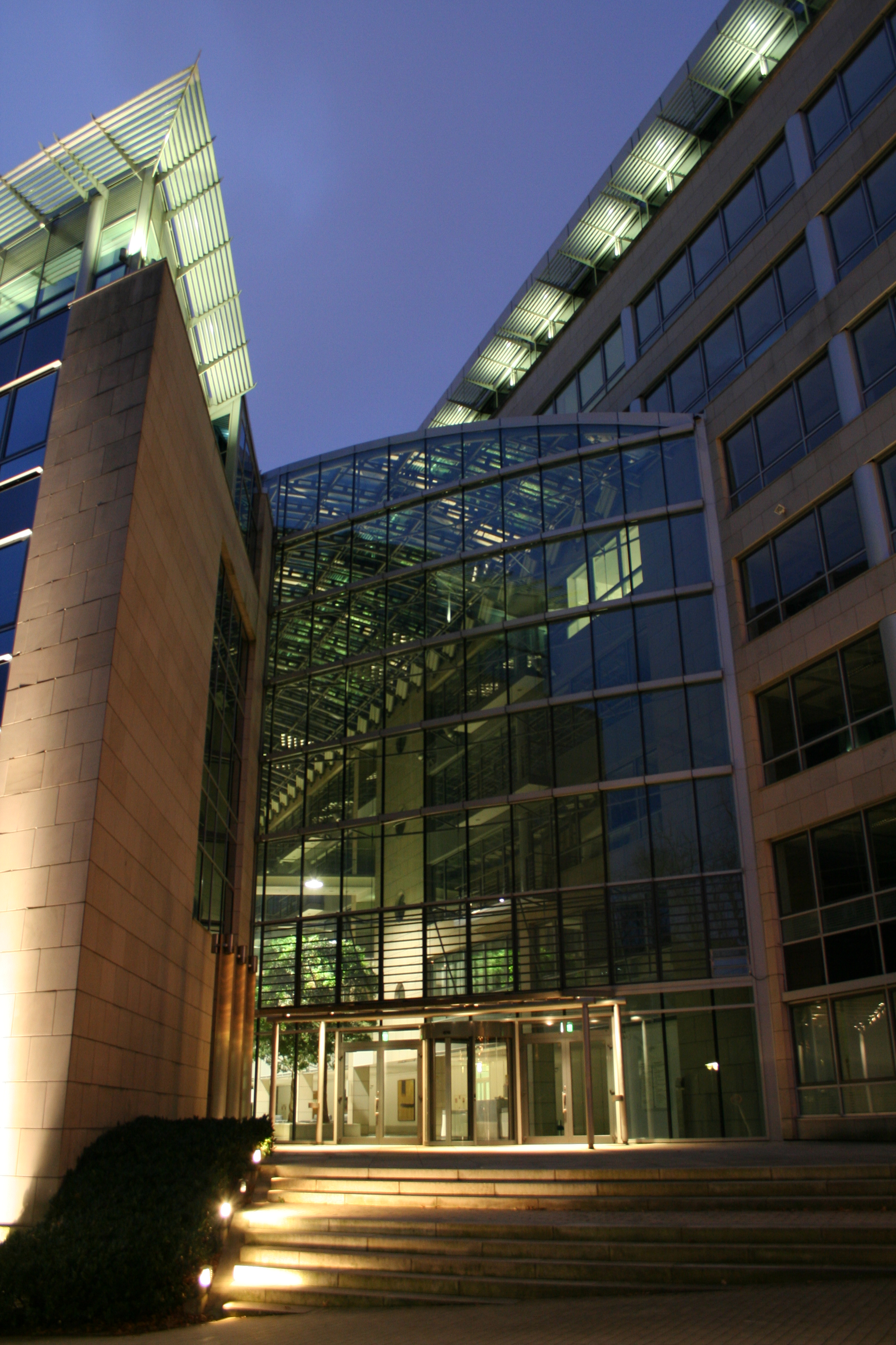 Beschreibung: Sparkasse in Wuppertal Eingang in der Nacht Quelle: Selbst erstellt Datum: 24.Februar 2006/ 22.Februar 2007 Autor: Thomas Kathöfer